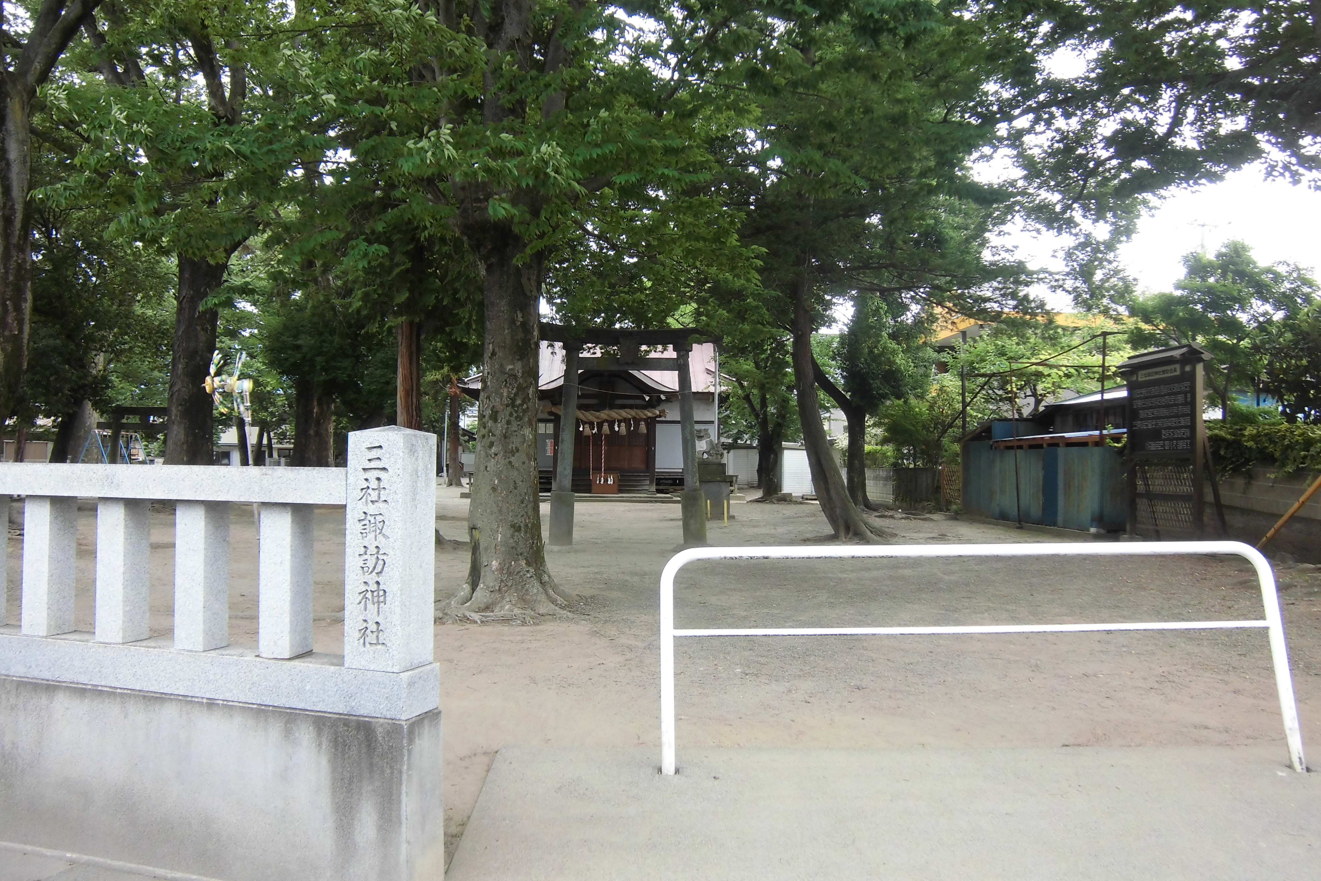 山梨県甲府市上石田・三社諏訪神社